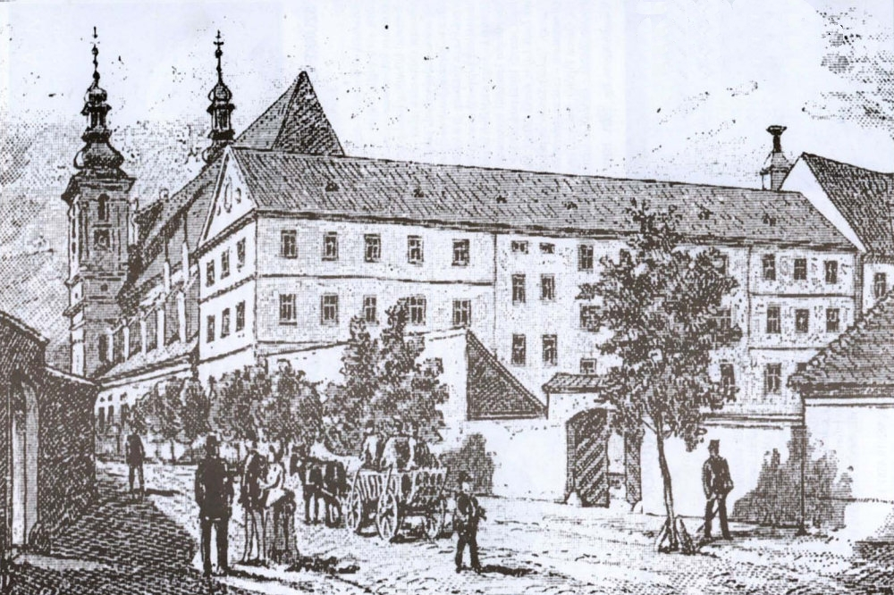 A Nagyszombati Egyetem az Eötvös Loránd Tudományegyetem jogelődje. 1635. május 12-én alapította Pázmány Péter esztergomi érsek.